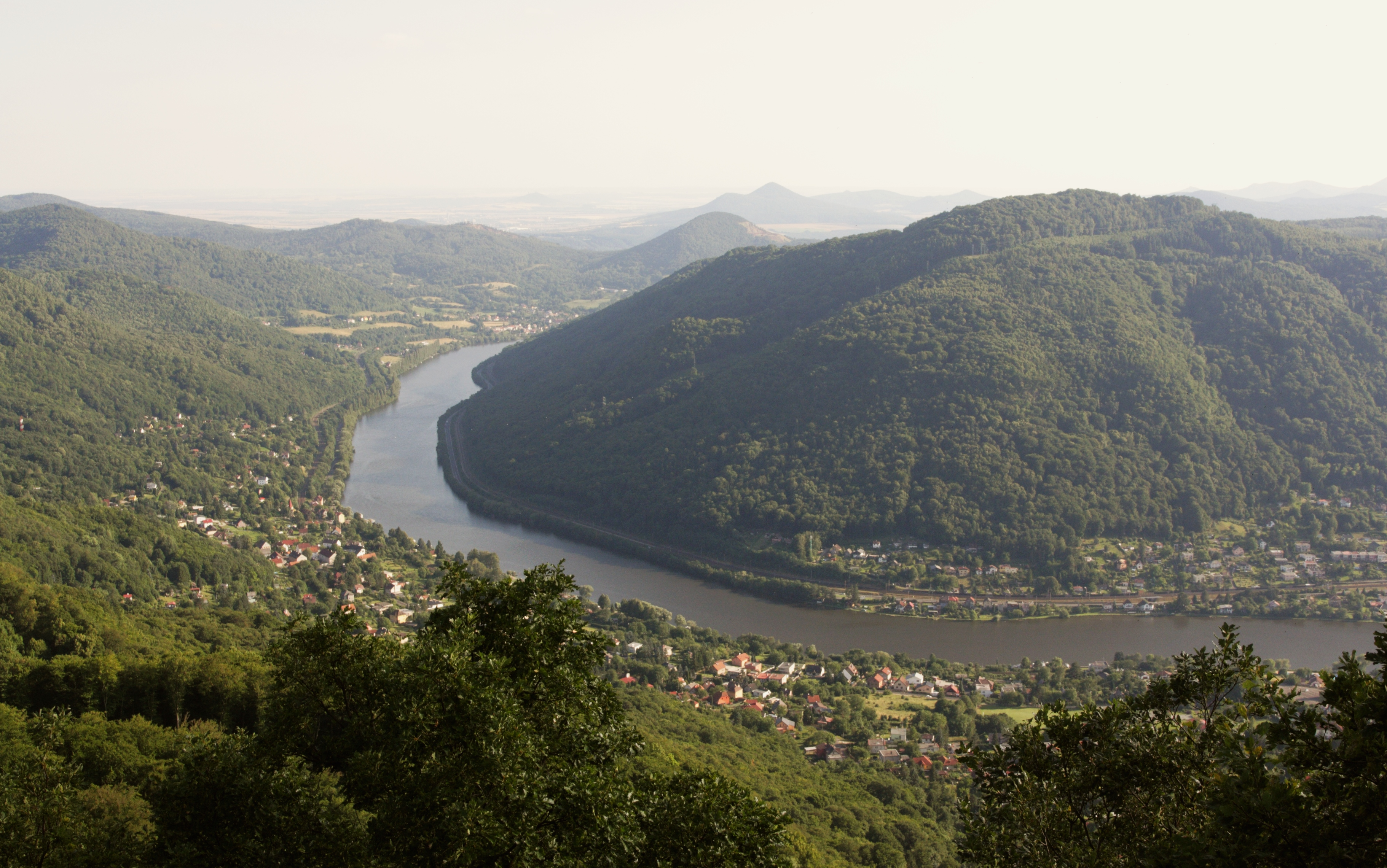 Vysoký Ostrý - pohled k jihu na Portu Bohemicu.